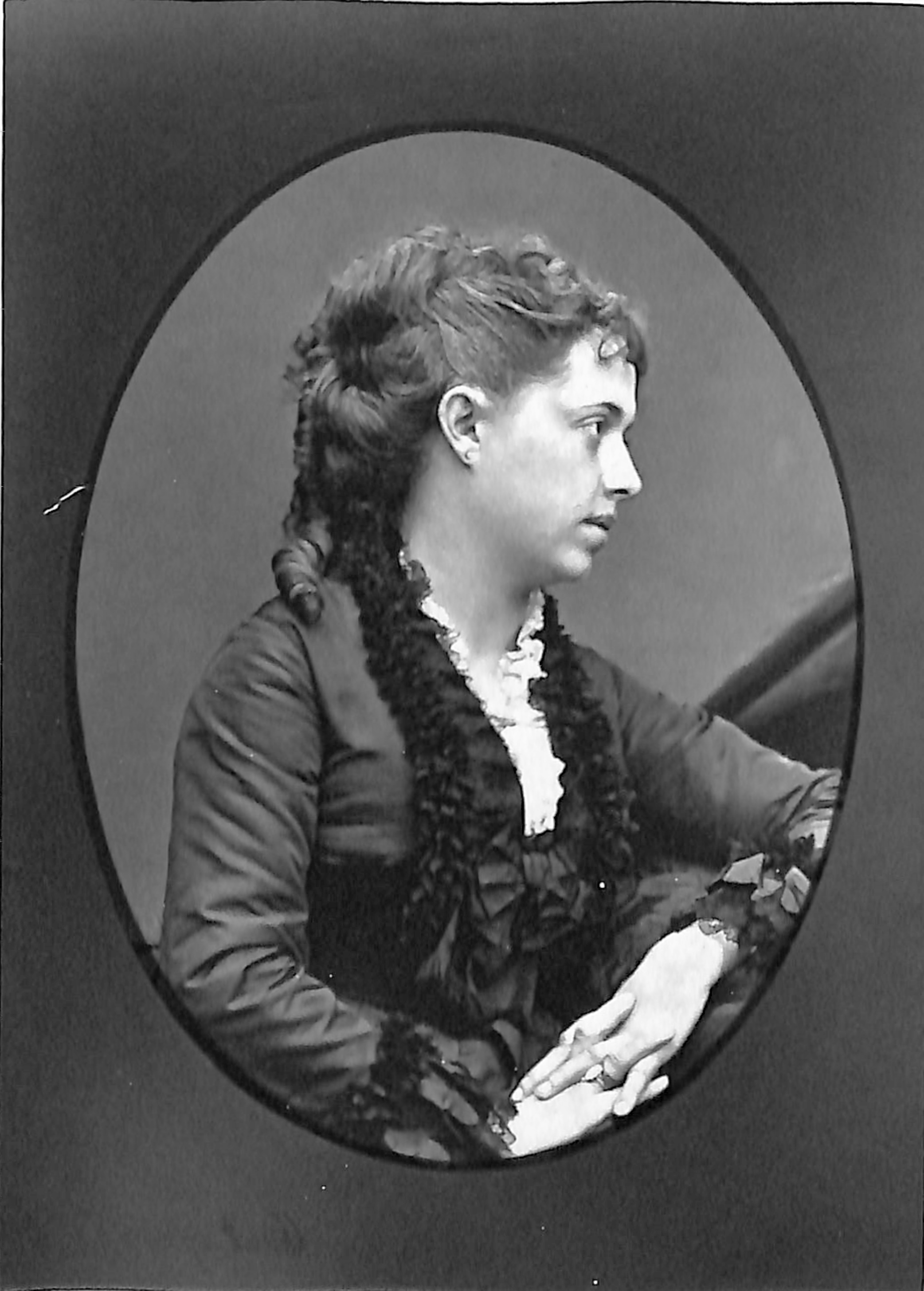 Marie Delaporte dite Minette